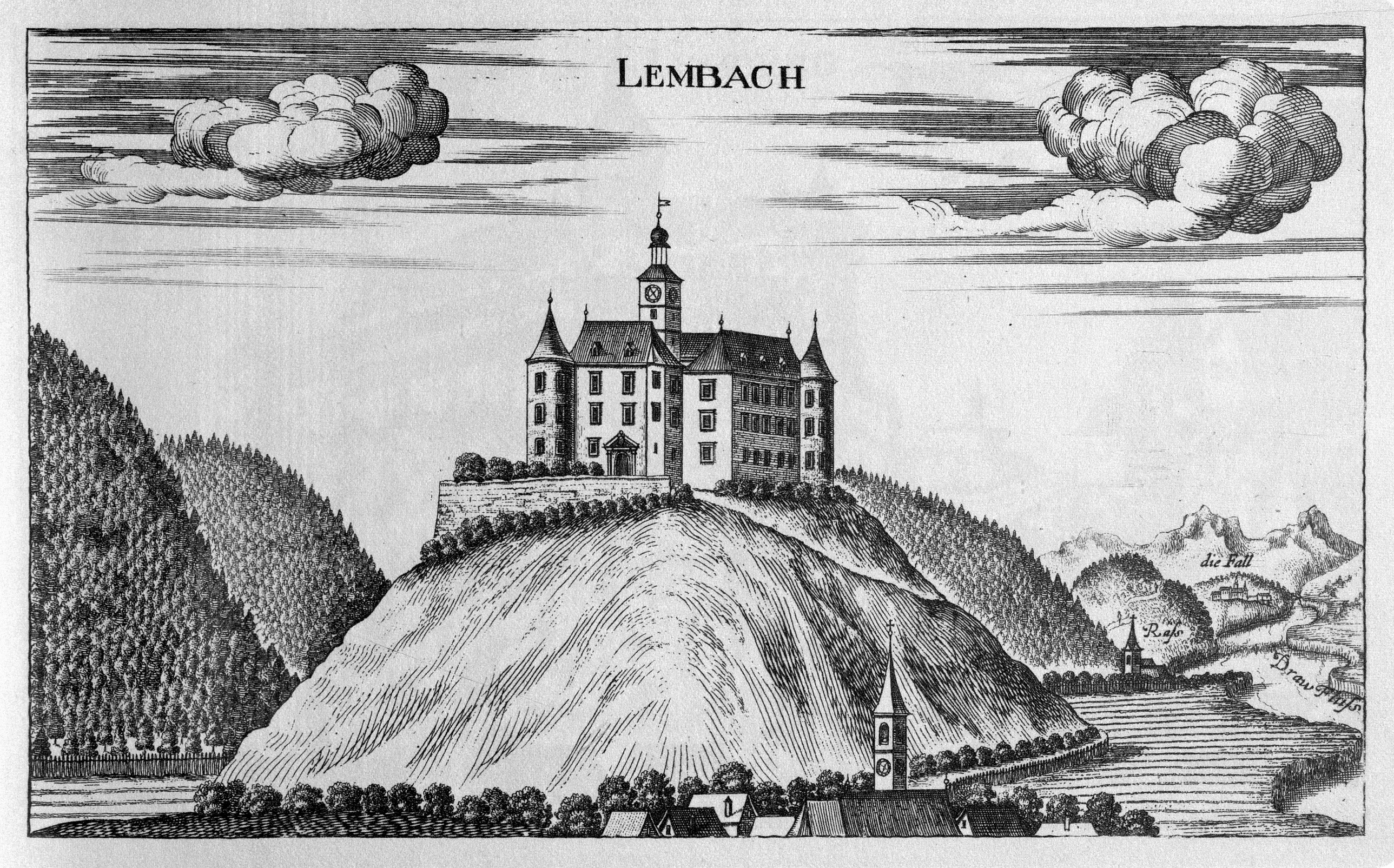 G. M. Vischers Käyserlichen Geographi, Topographia Ducatus Stiriae, Das ist: Eigentliche Delineation / und Abbildung aller Städte / Schlösser / Marcktfleck / Lustgärten / Probsteyen / Stiffter / Clöster und Kirchen / so es sich im Herzogthumb Steyrmarck befinden; Und anjetzo Umb einen billichen Preyß zu finden seynd Bey Johann Bitsch Universitäts Buchhandlern / Auff dem Juden=Platz bey der guldenen Saulen. Graz 1681 Die Nummerierung der Dateien folgt der alphabetischen Reihung der Ortsnamen